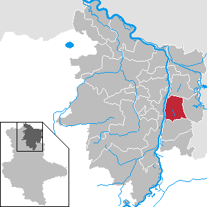 Klietz im Landkreis Stendal, Sachsen-Anhalt